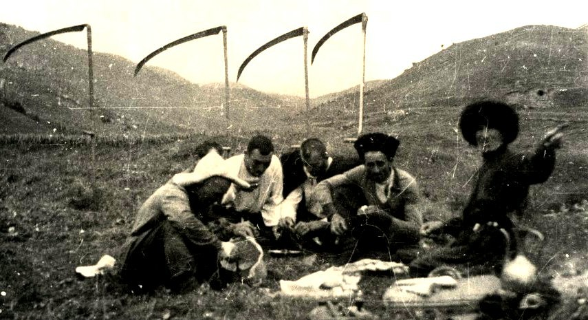 Косцы в селении Пуй. 1939 год.